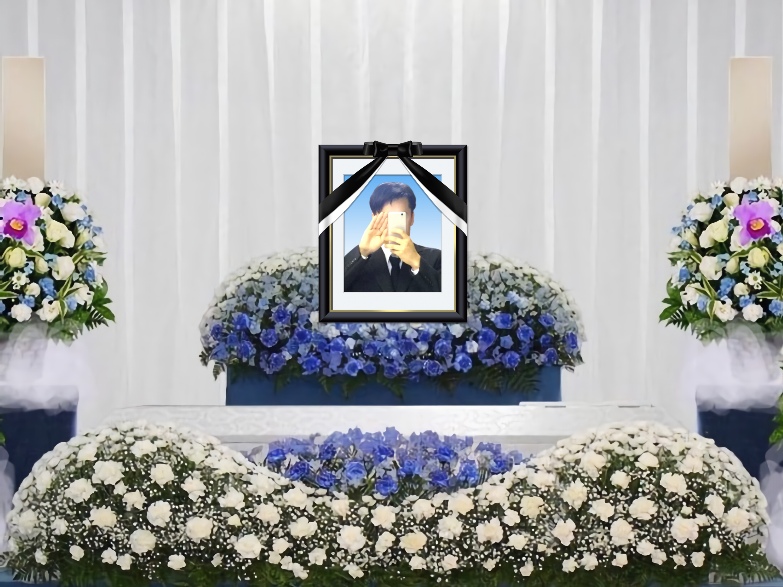 葬儀の一例